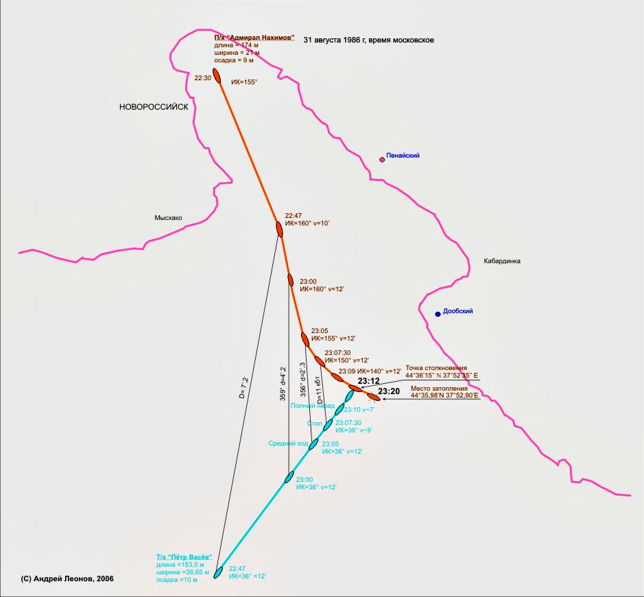 Схема столкновения п/х "Адмирал Нахимов" с т/х "Пётр Васёв" 31 августа 1986 года